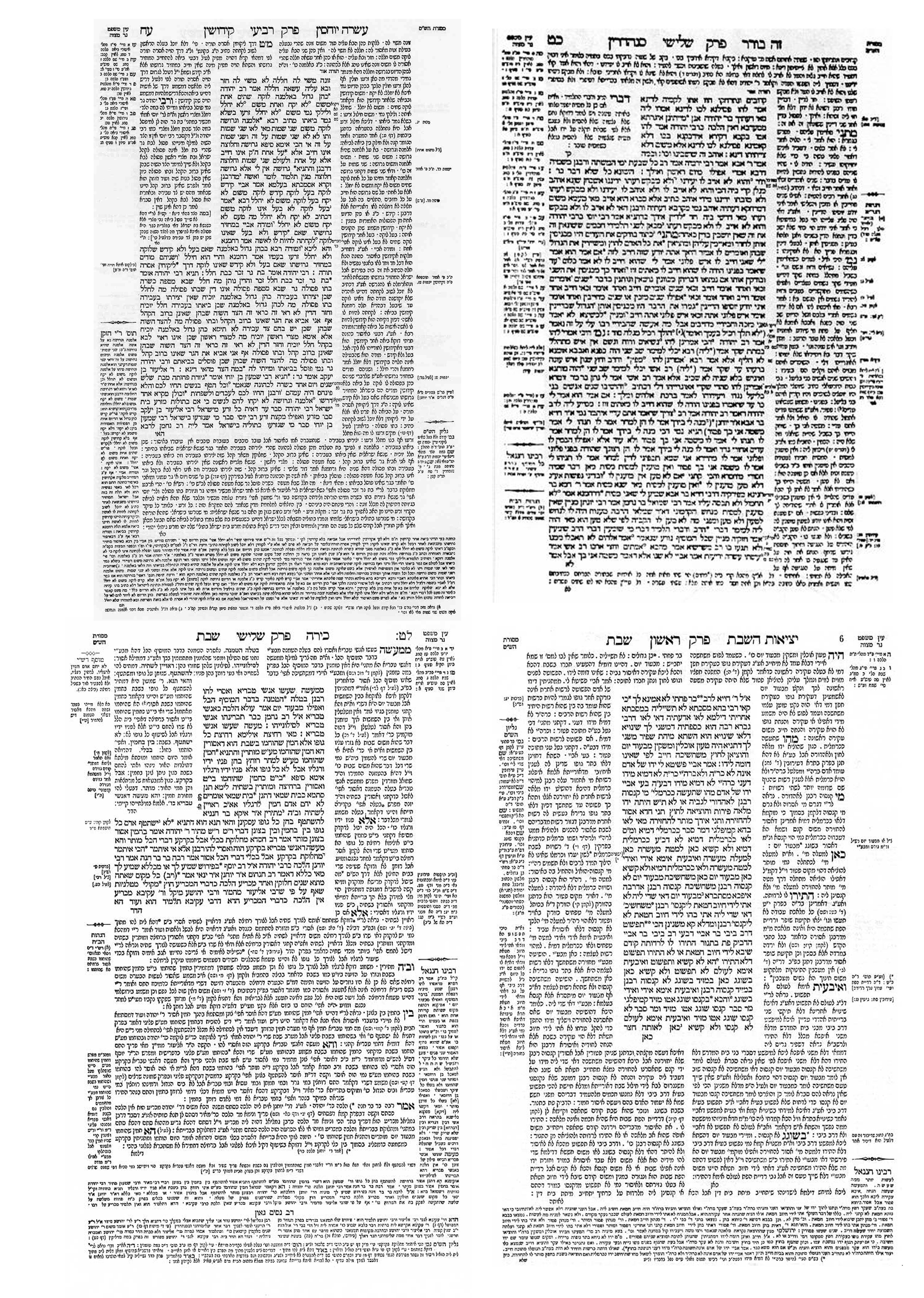 Изображение различных листов талмуда, как пример разнообразия.